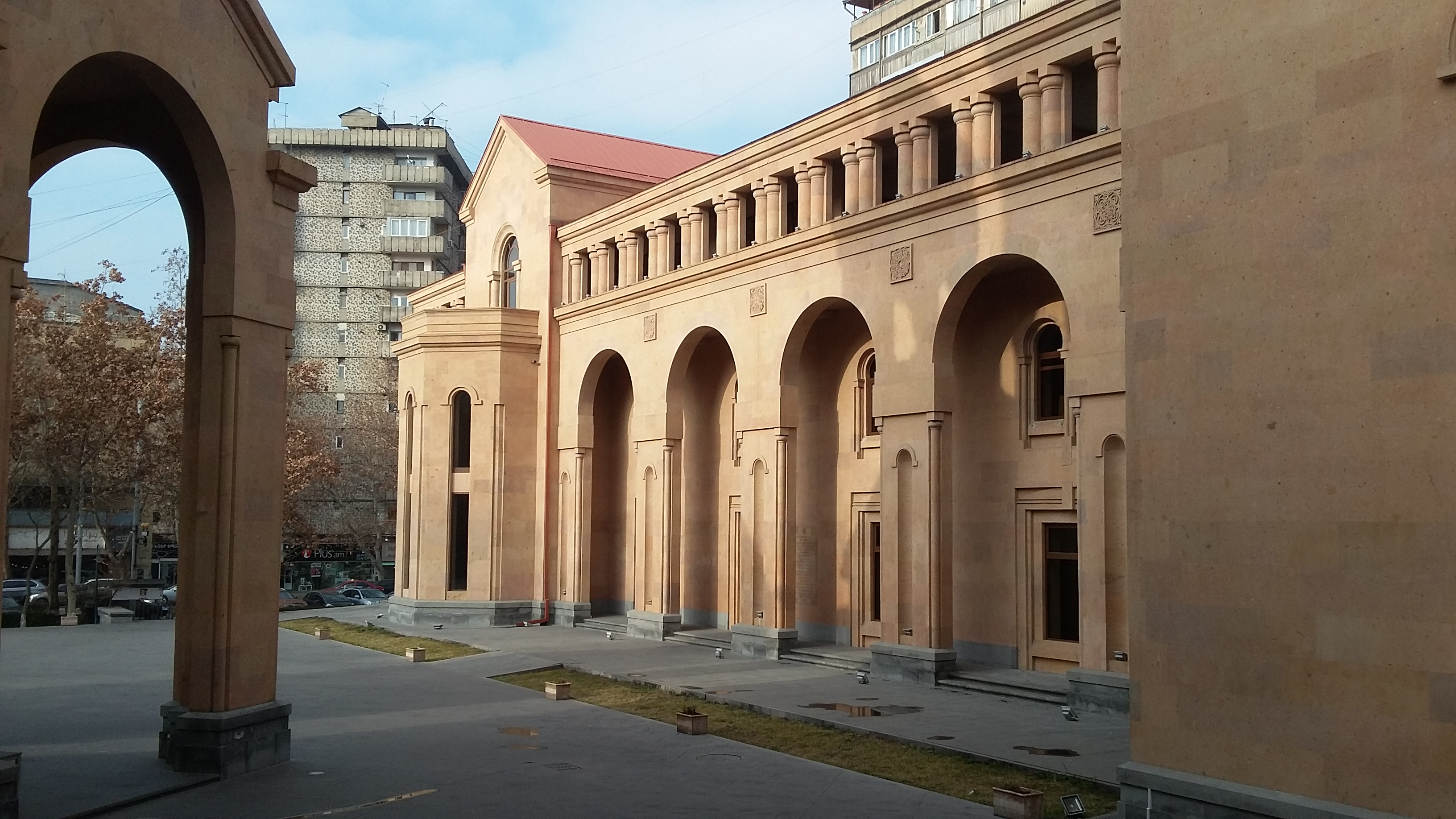 Սուրբ Աննա եկեղեցի և Կաթողիկե եկեղեցի, Երևան, Աբովյան փողոց